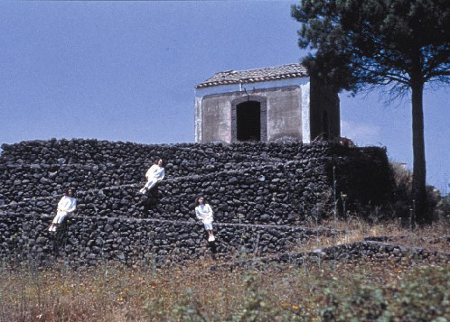 Immagine di uno spettacolo di Fabrizio Crisafulli svolto sulle pendici dell'Etna. Tre ragazze sottolineano con il corpo le diverse inclinazioni di un muretto.